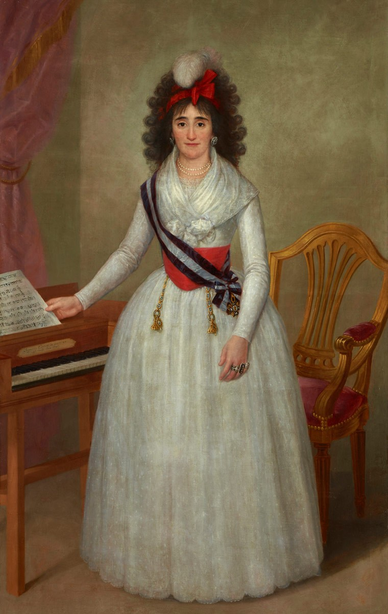 Retrato de María de la Concepción Belvis de Moncada y Pizarro, VIII Marquesa de Ariza